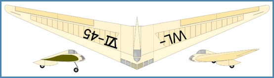 Horten 3b